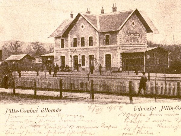 Pilis-Csaba vasútállomás. Postcard.